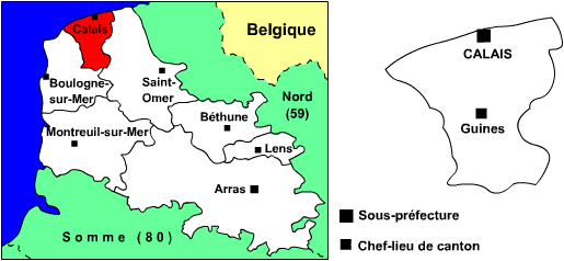 Carte de l'arrondissement de Calais (62) avec chefs-lieux de cantons Utilisateur:Manchot sanguinaire